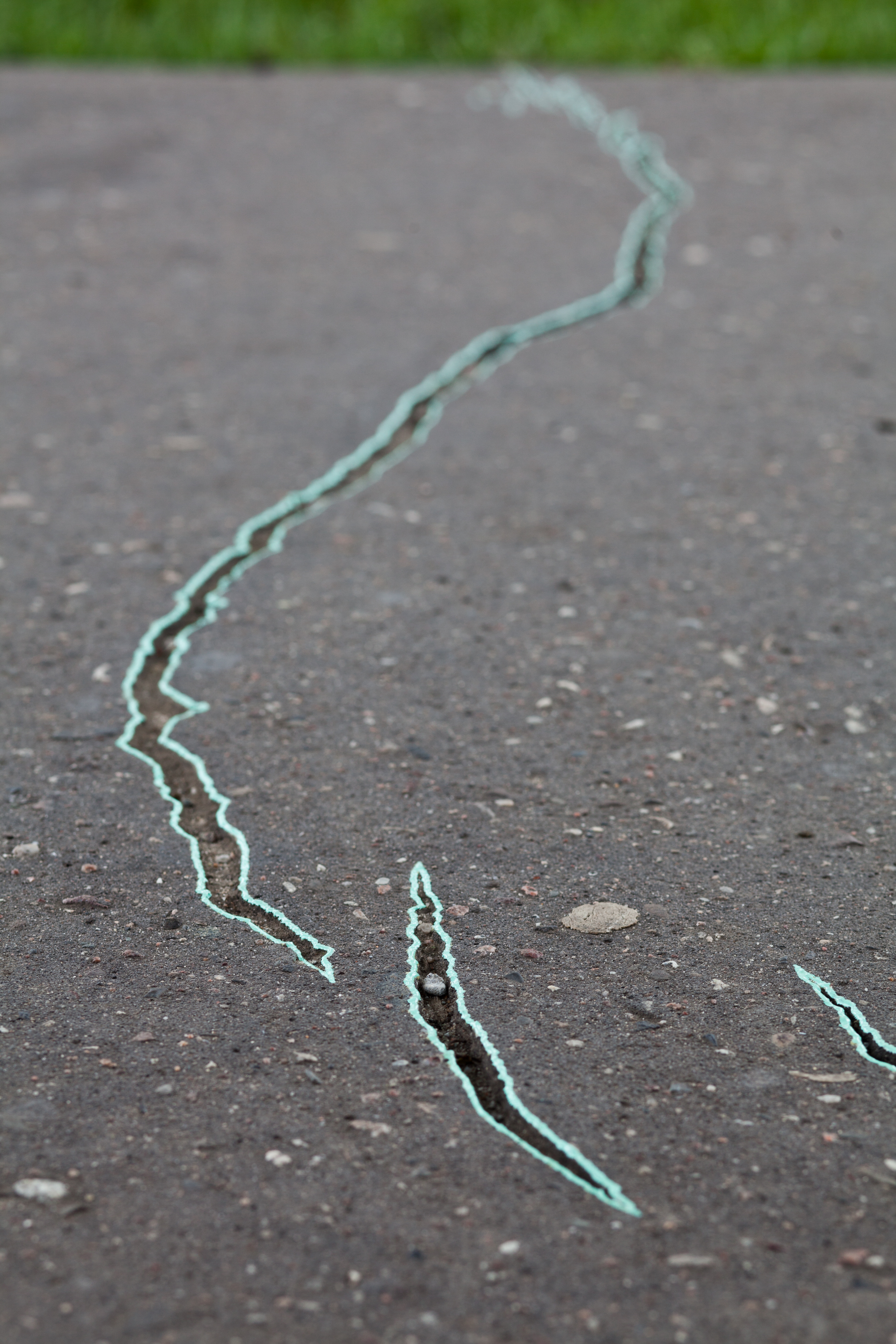 Latem 2010 roku Katarzyna Przezwańska wykonała kilkanaście interwencji malarskich w Parku Bródnowskim, korzystając z „naturalnych” fenomenów tego miejsca, zwracając uwagę na zużycie budowlanych materiałów, jak i wykorzystując znalezione obiekty o właściwościach rzeźbiarskich. Abstrakcyjne malarstwo Przezwańskiej pojawia się w relacji do pęknięć w chodnikach, ścieżek z betonowych płyt, ubytków w asfalcie oraz zastanej infrastruktury parkowej: donic, zbiorników wodnych, ławek. Powstające pod gołym niebem obrazy podkreślają egzotykę parku w centrum blokowiska. Kolory użyte przez artystkę zapożyczone są najczęściej z fasad okolicznych bloków mieszkalnych, pojawiają się też „obce” jaskrawe róże czy błękity.